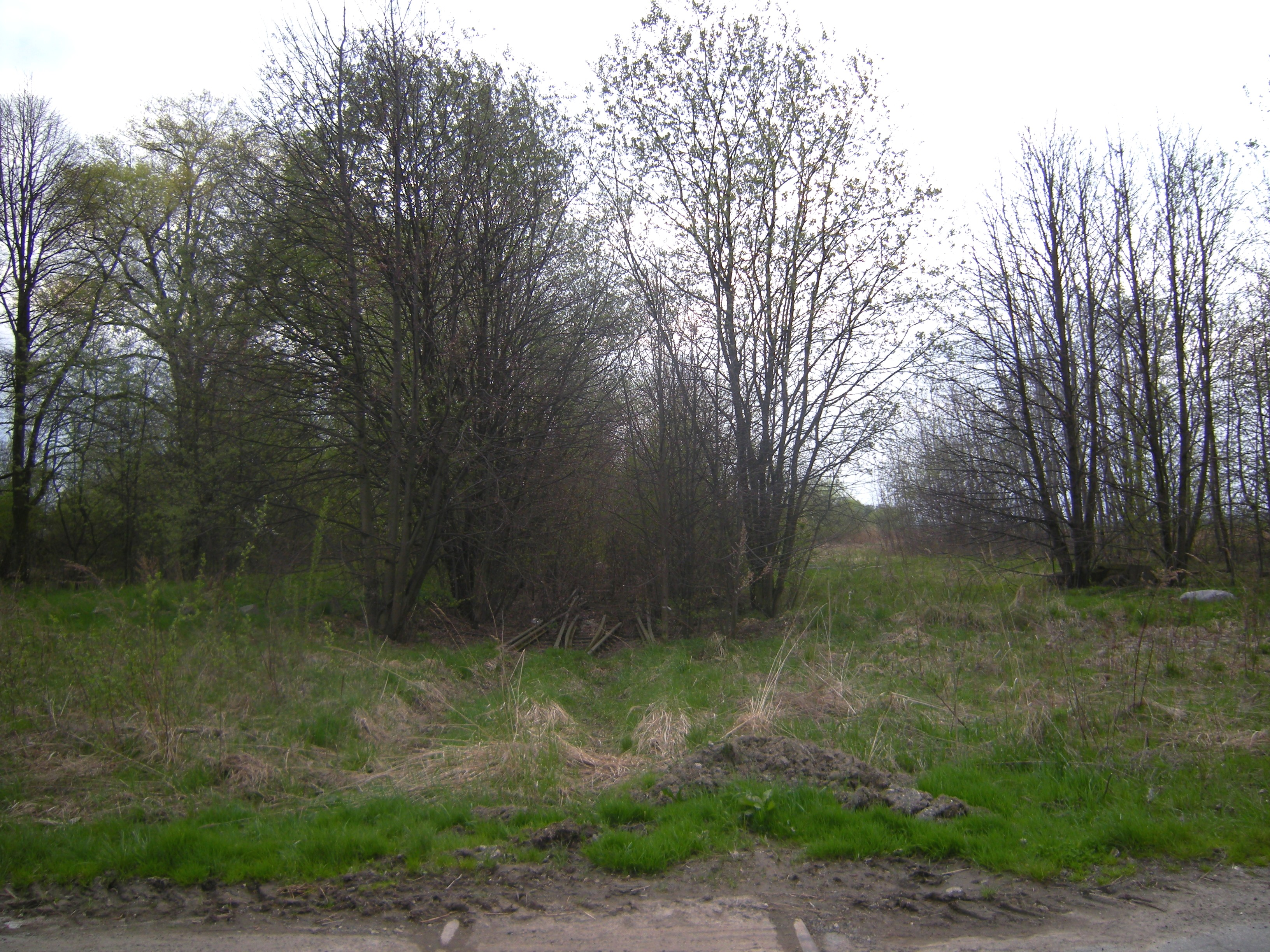 Miejsce po przystanku kolejowym Koperniki